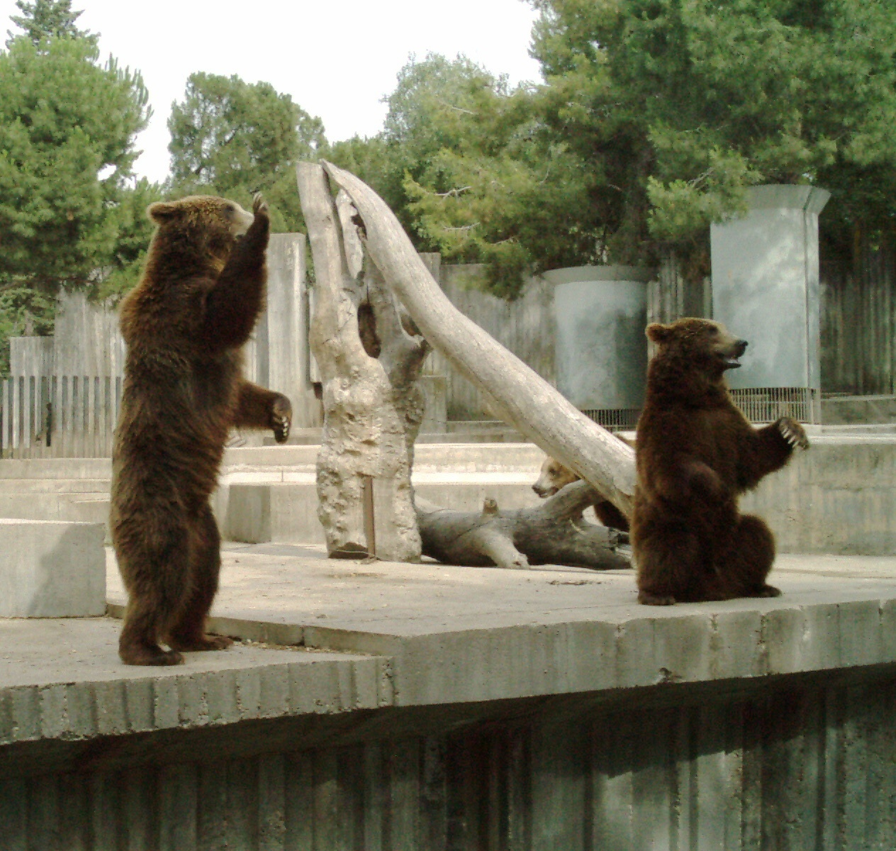 Osos pardos (Ursus arctos)en el zoo de Madrid.